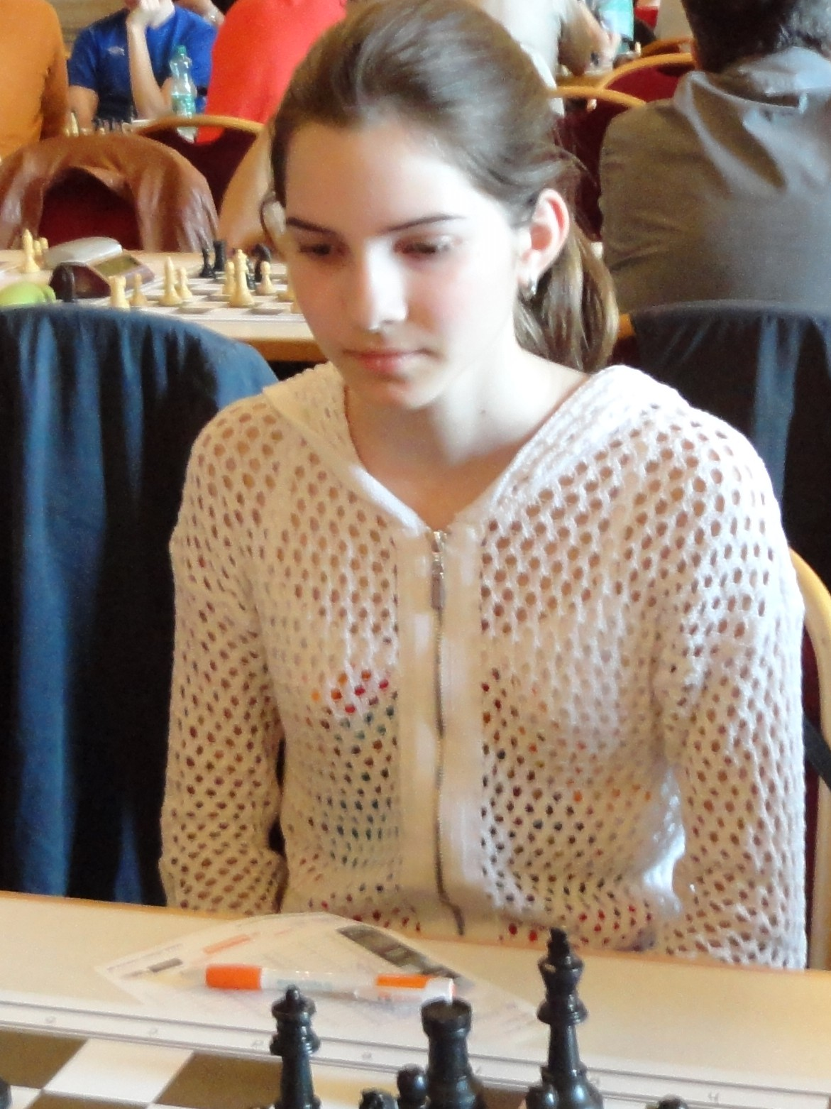 Alexandra Dimitrova, Vienna Chess Open 2015 in Wien, Runde 9.